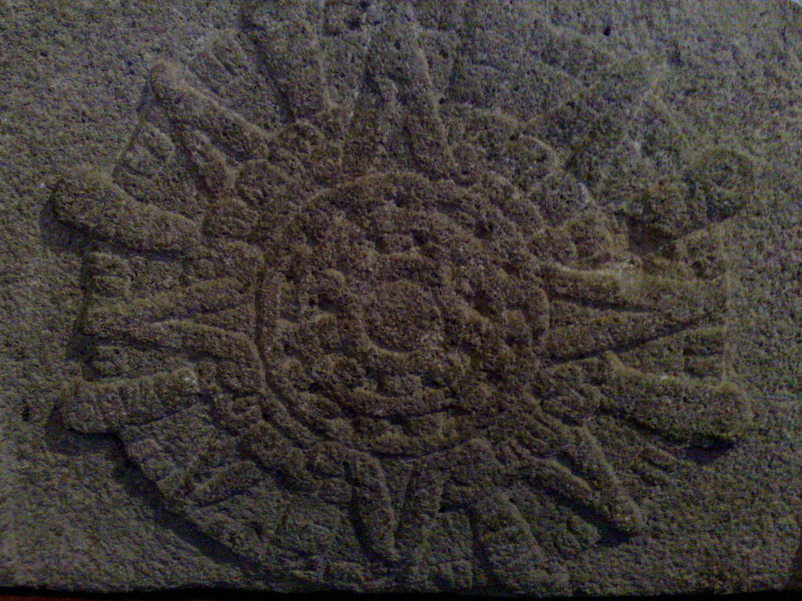 Fragmentos de la pirámide de Santa Cecilia Acatitlán